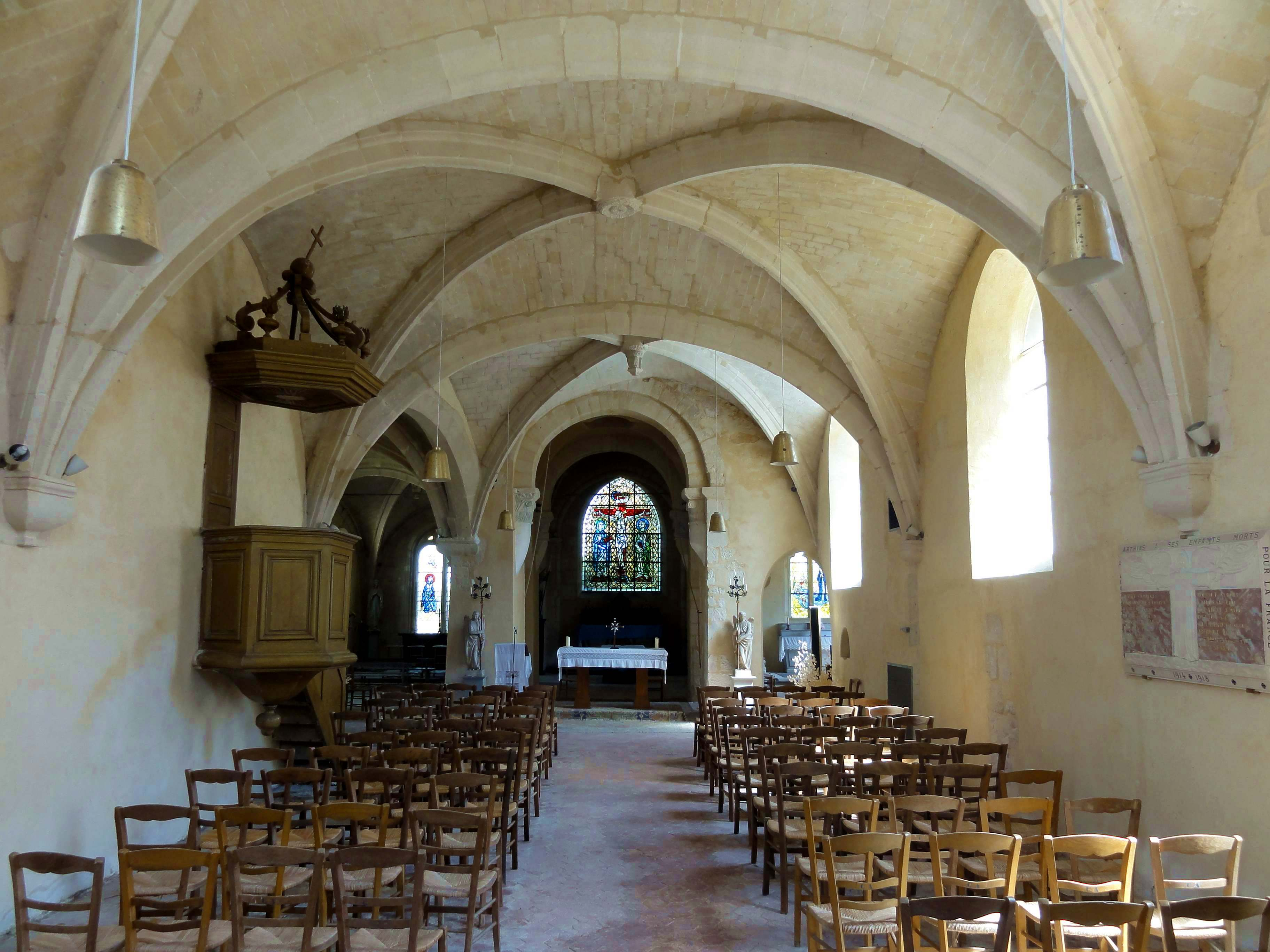 Intérieur de l'église (voir titre).